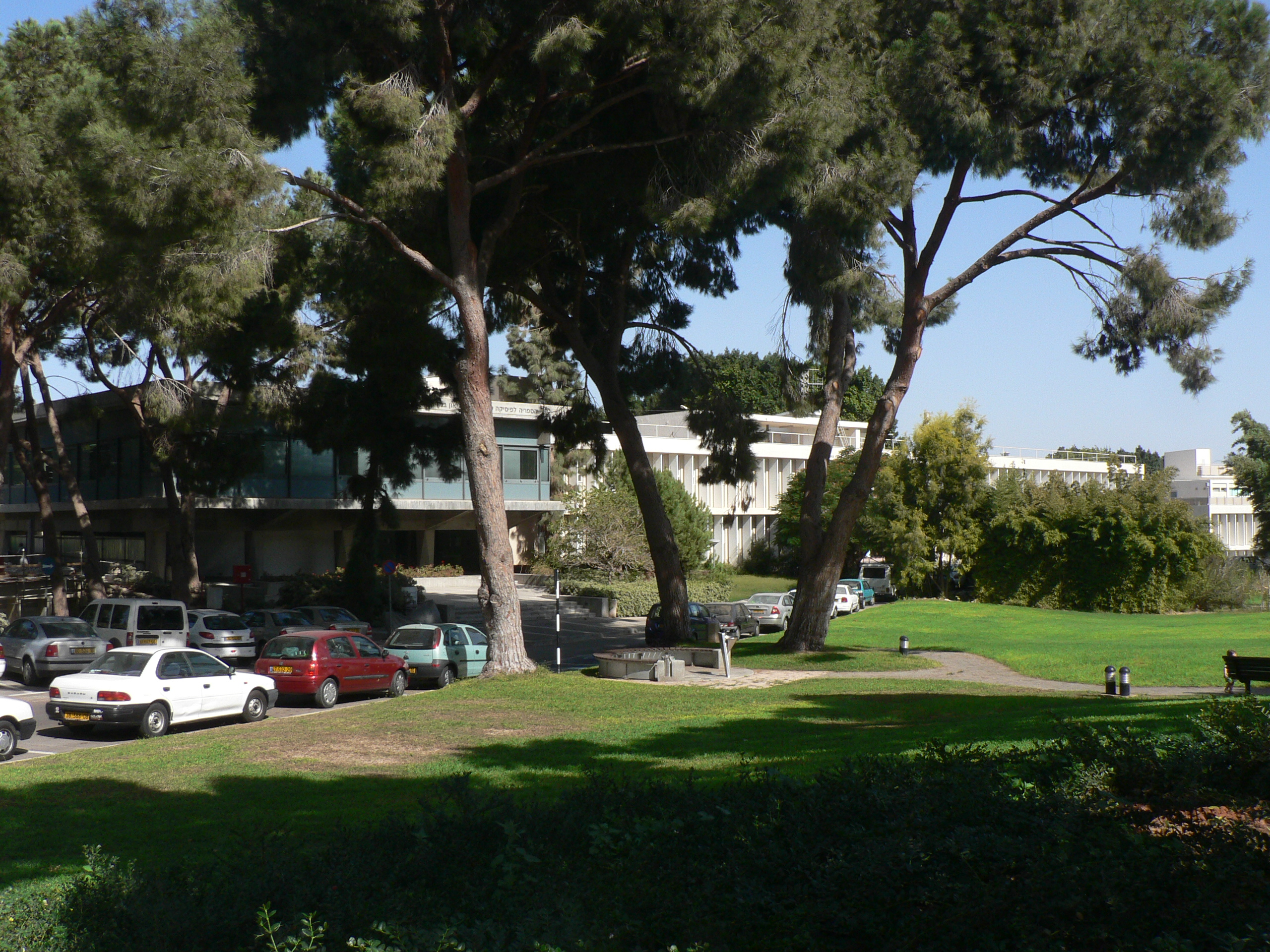 Weizmann Institute of Science, Israel - - The Physics faculty מכון ויצמן למדע, הפקולטה לפיזיקה